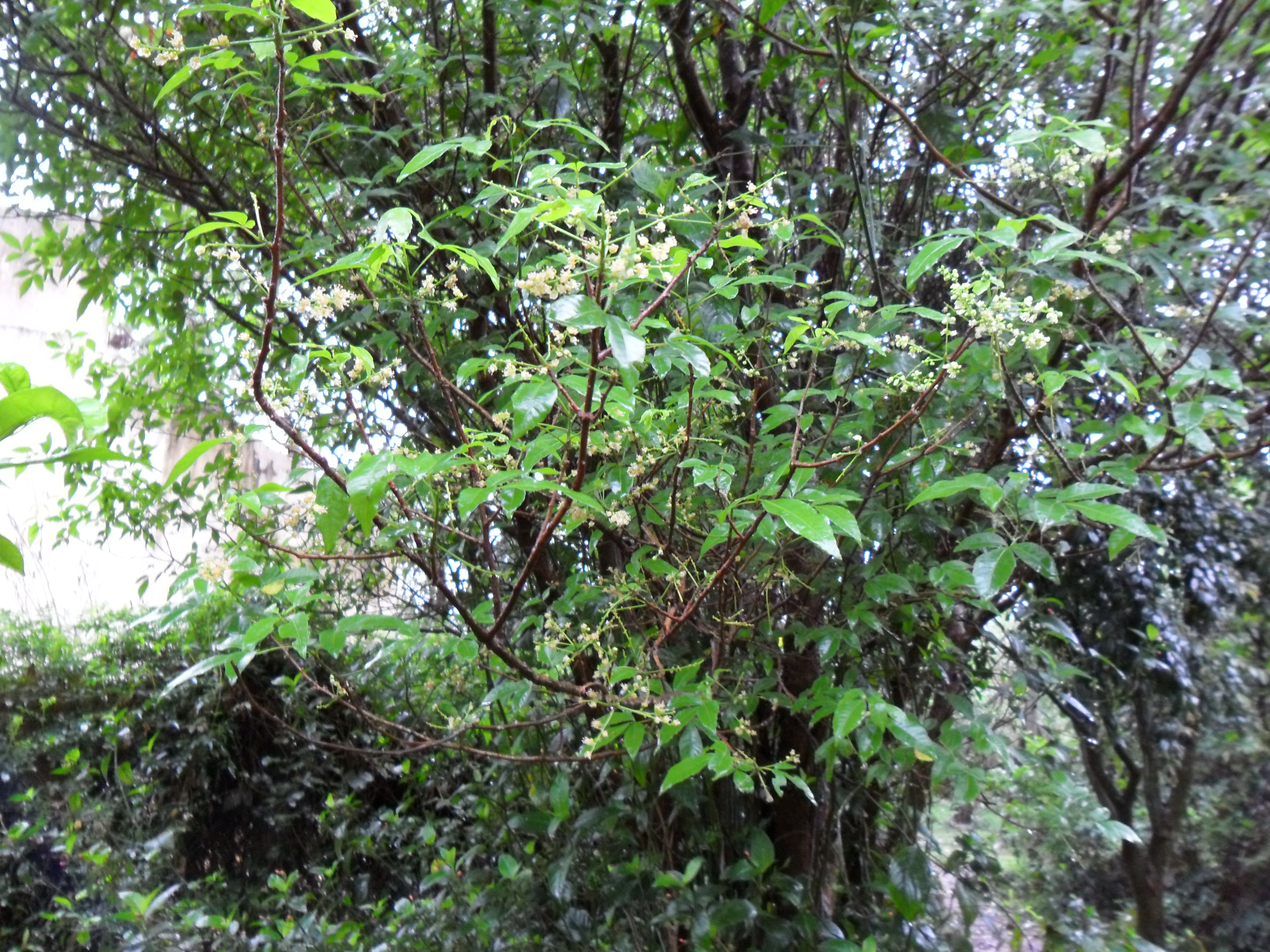 Allophylus edulis, cucú, florecido en Misiones Argentina en la primavera